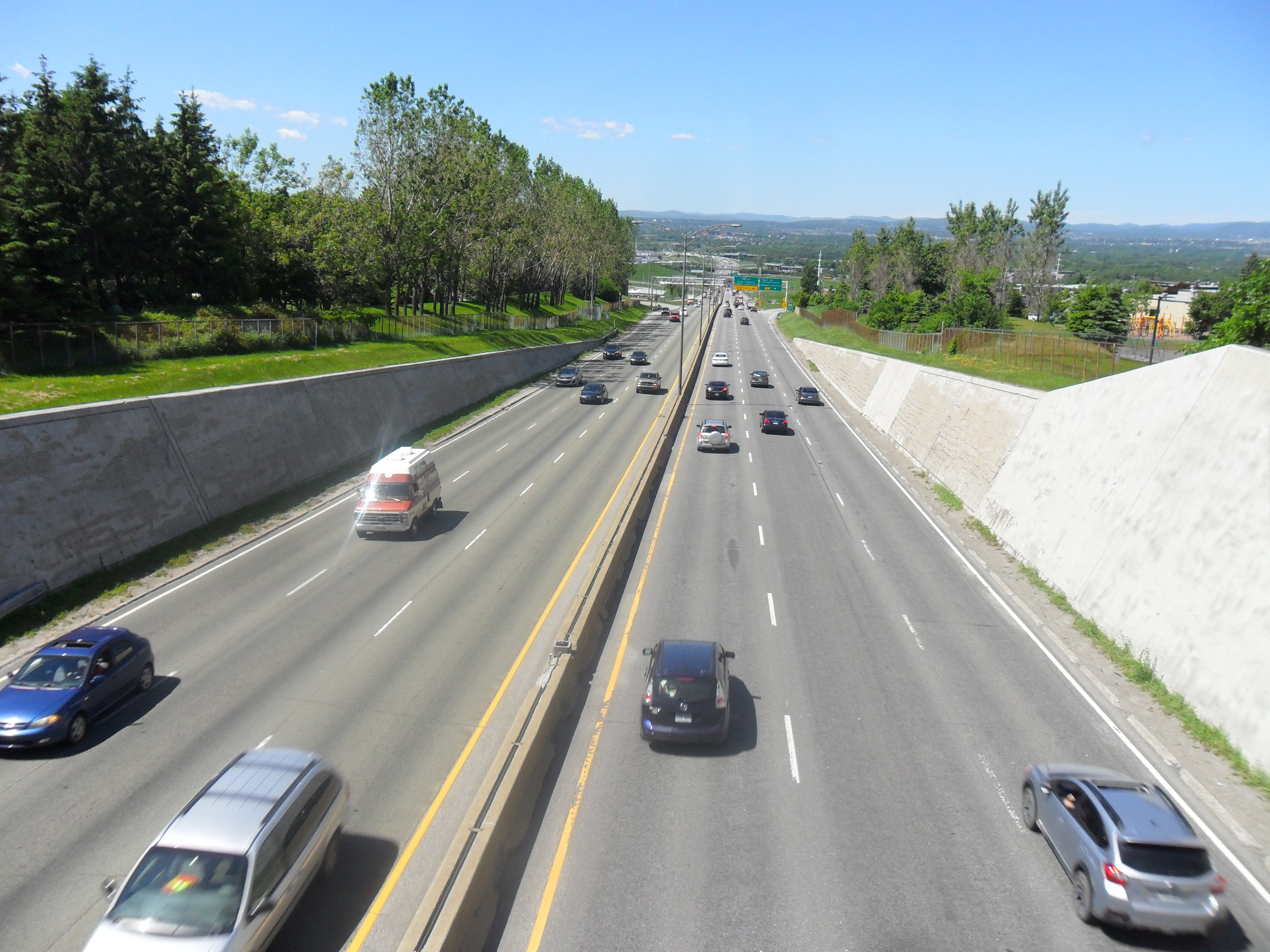 Autoroute Henri-IV